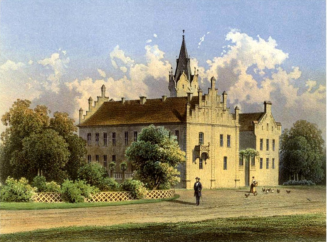 Schloss Beesdau, Kreis Luckau, Provinz Brandenburg, Lithografie aus dem 19. Jahrhundert